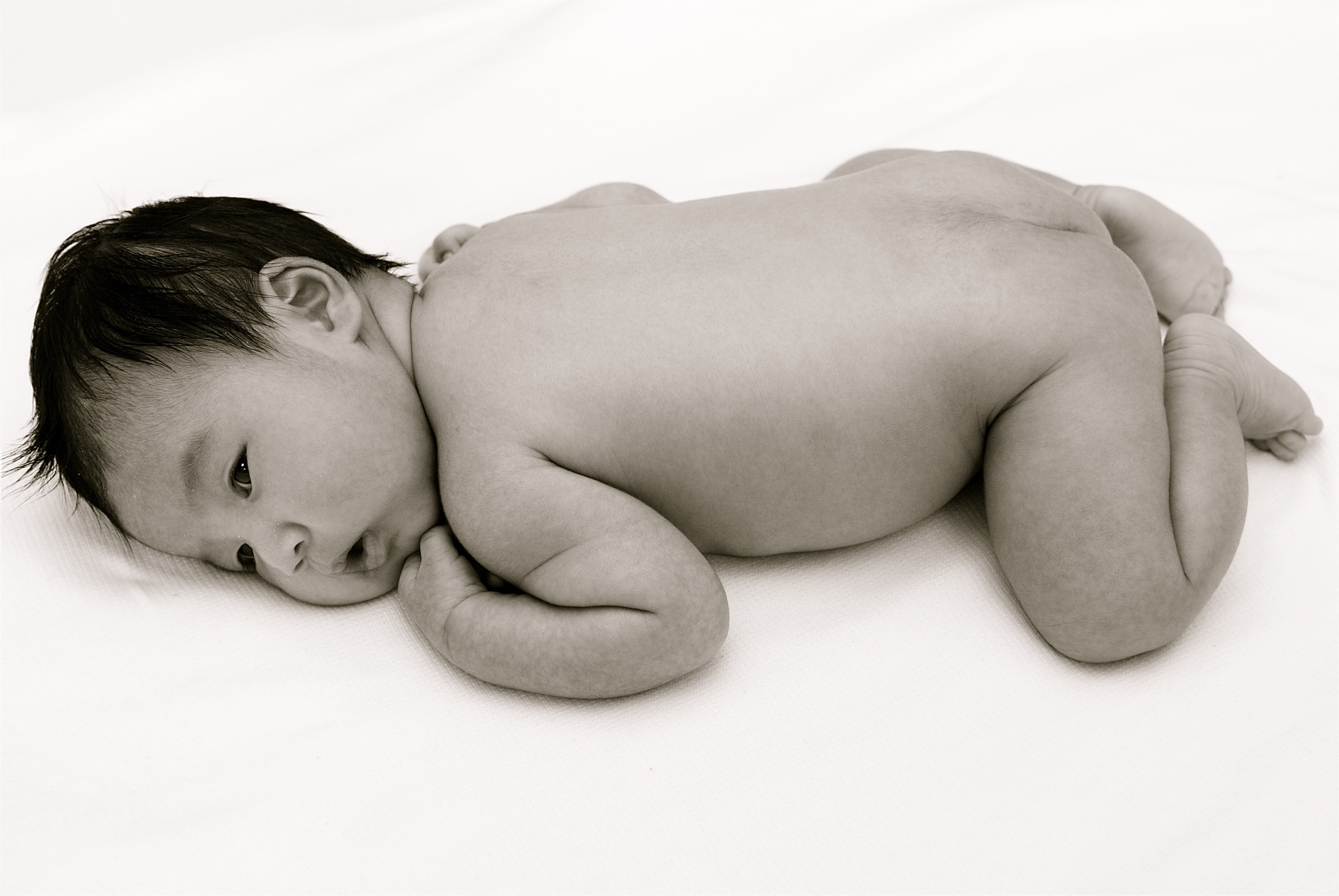 Baby